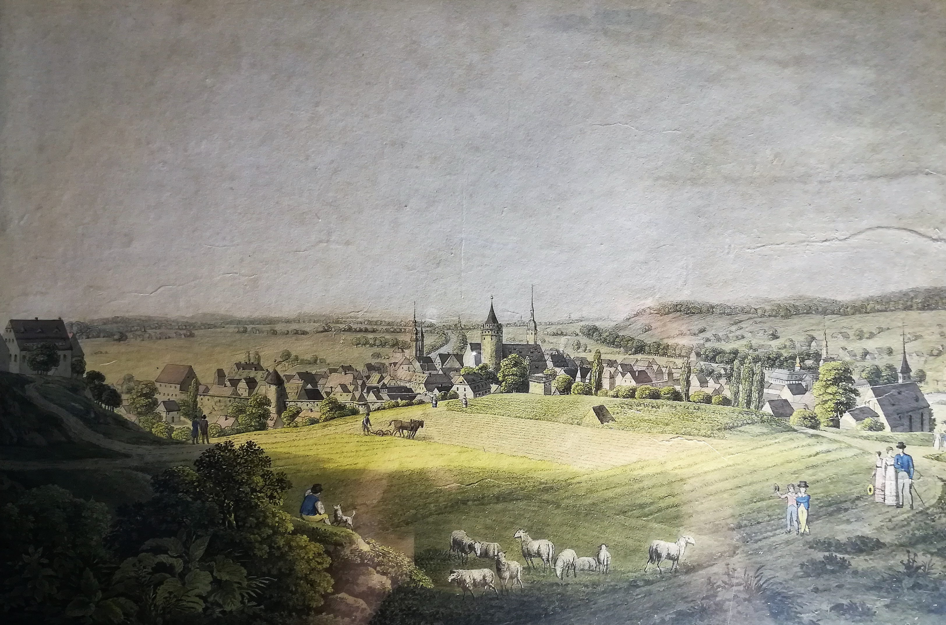 Widok Lubania z XVIII w. Autor nn.